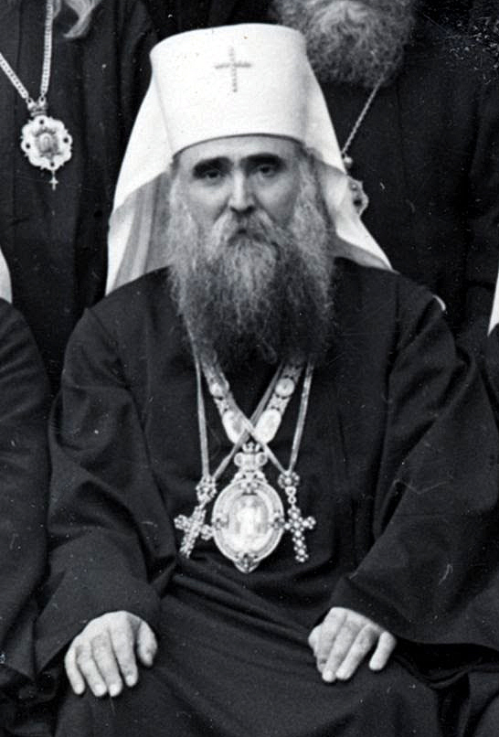 Патриарх Сербский Варнава возглавляет совещание заграничных русских архиереев в Сремских Карловцах, на котором было выработано "Временное положение о Русской Православной Церкви заграницей." Октябрь 1935 г.